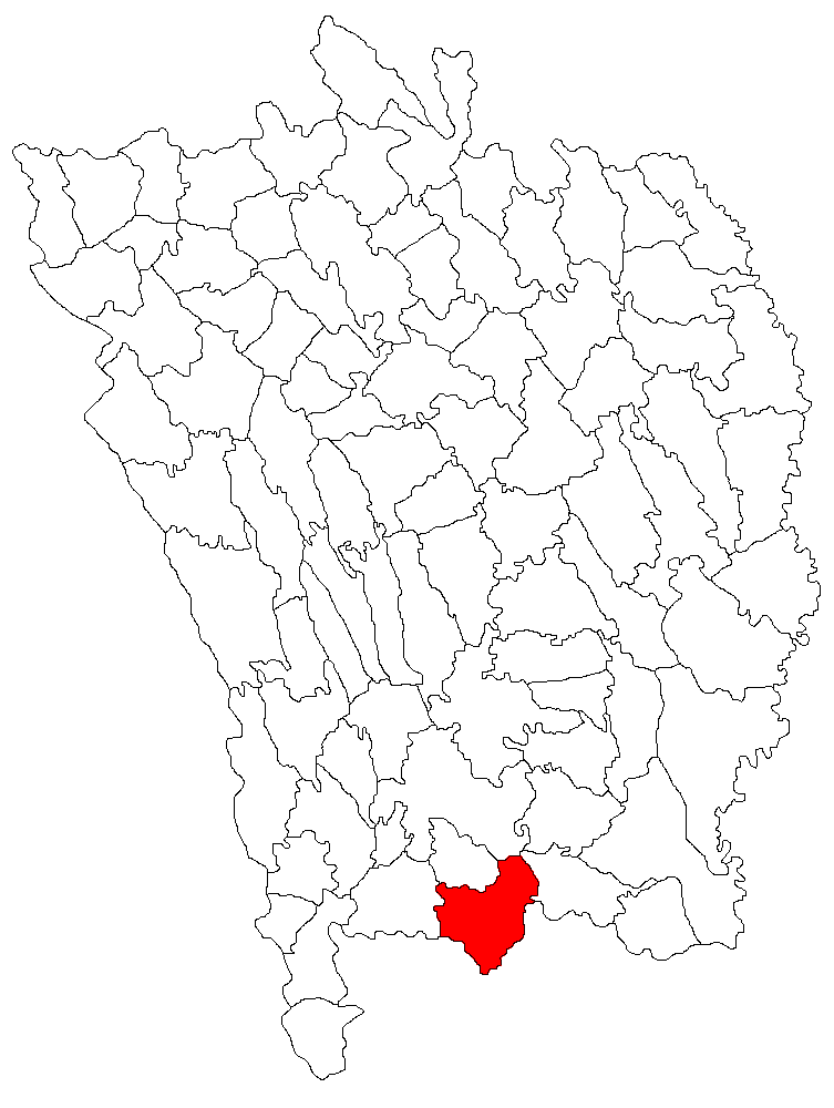 Categorie:Hărţi ale judeţului Vaslui